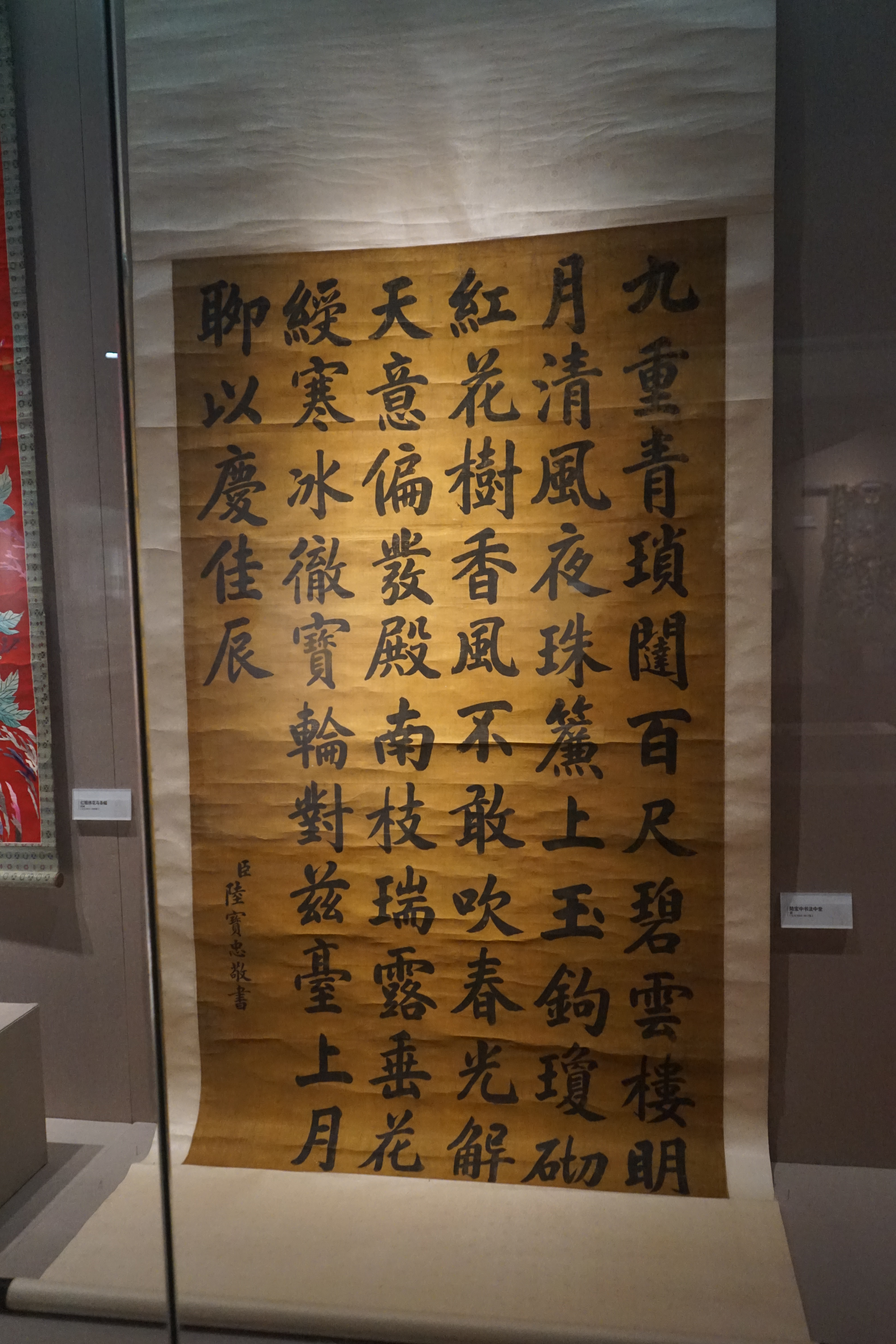 摄于柯桥区博物馆。原作者（1850-1908）